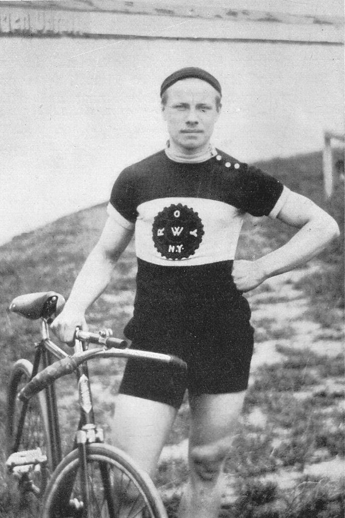 Arthurh Vanderstuyft, belgischer Radrennfahrer